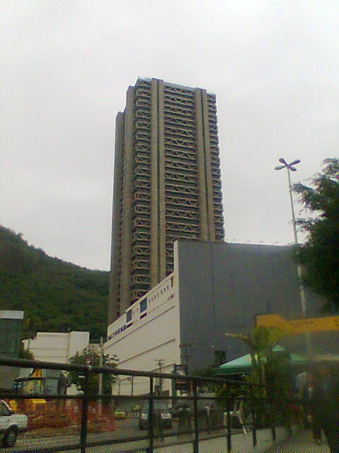 Torre Rio Sul, Rio de Janeiro, Brasil.